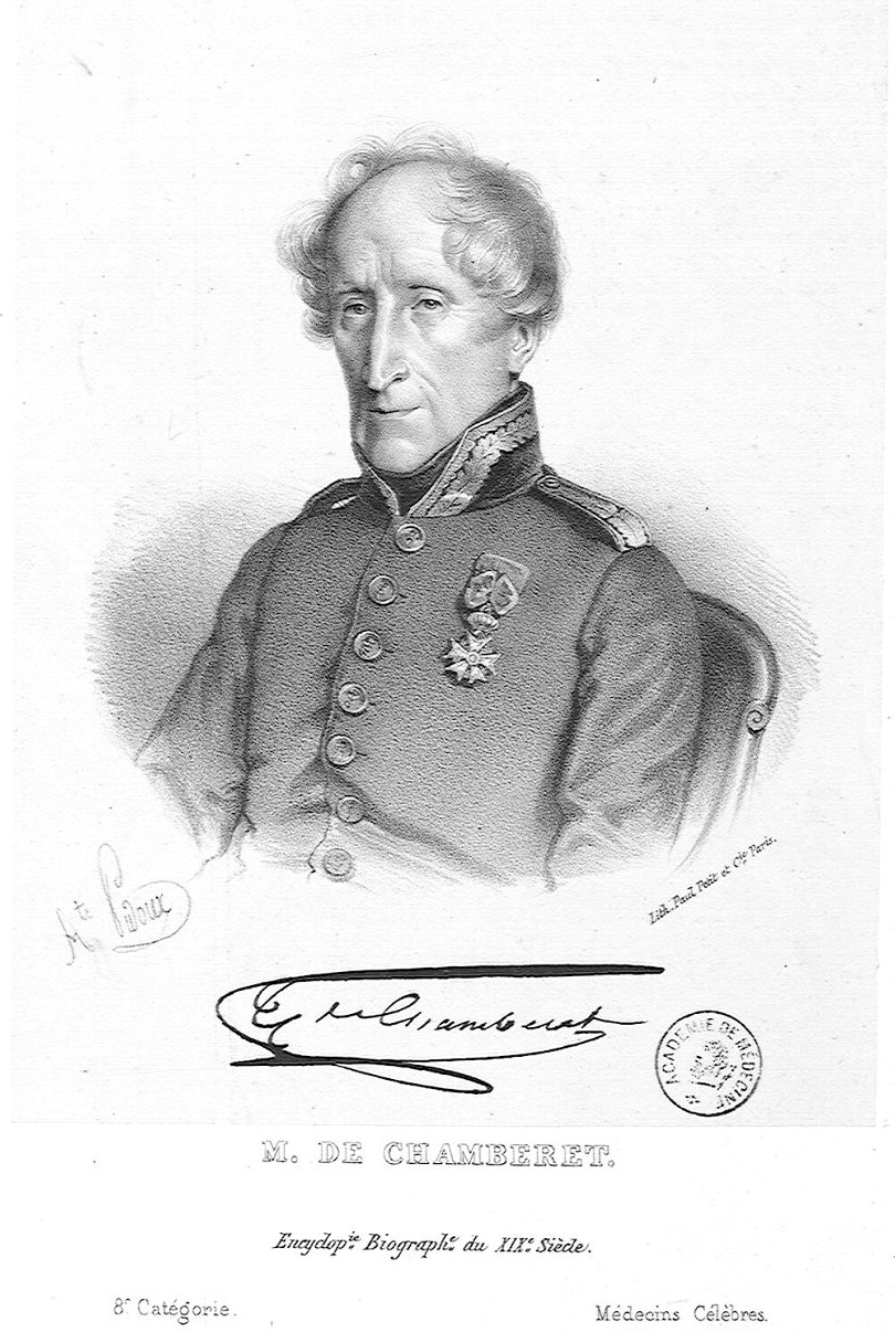 Jean-Baptiste Joseph Tyrbas de Chamberet (1779-1862)